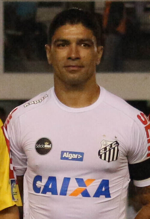 Lances partida válida pelo Campeonato Brasileiro de 2017 - Série A Lances partida válida pelo Campeonato Brasileiro de 2017 - Série A